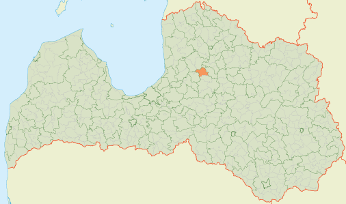 Drabešu pagasts